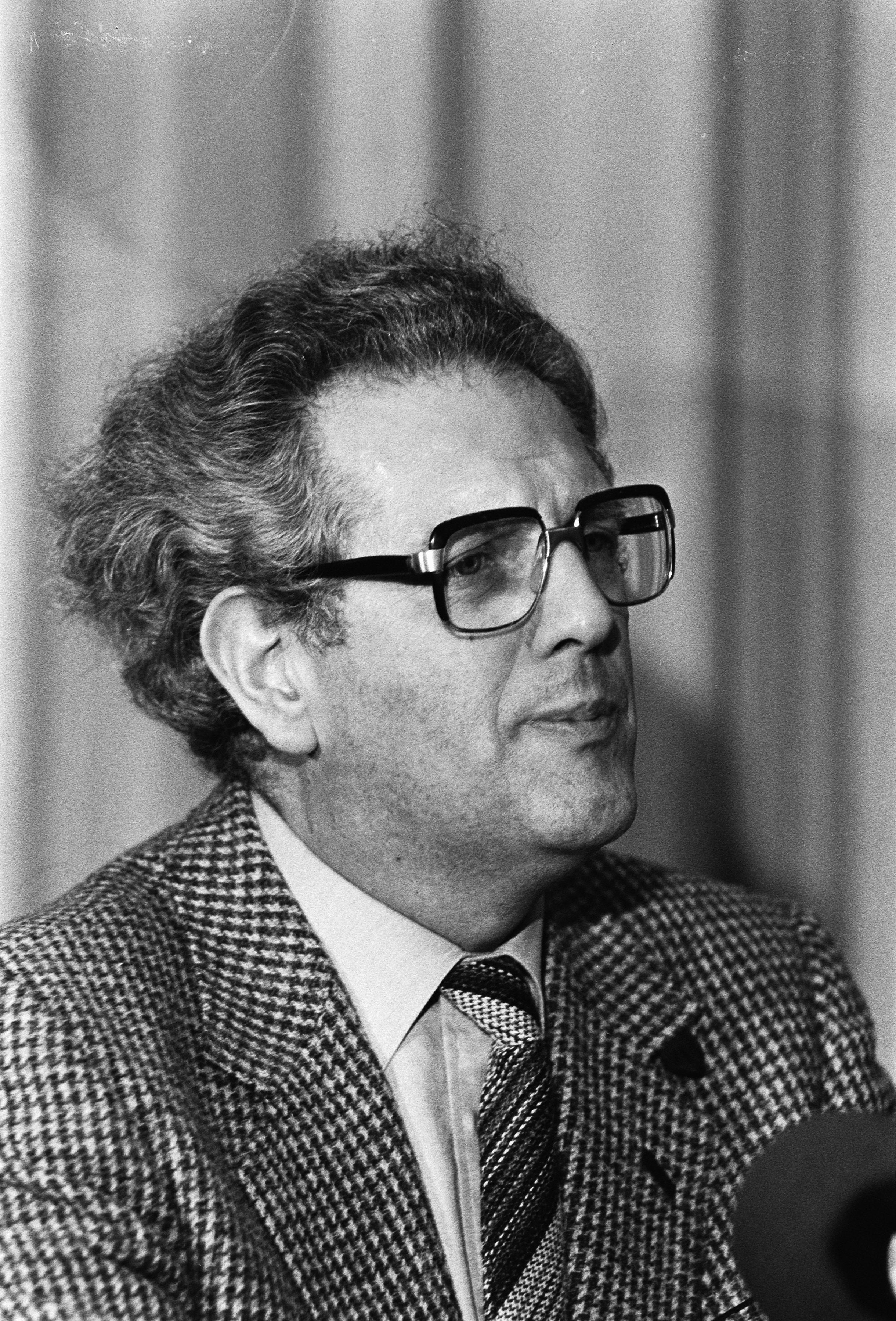 Collectie / Archief : Fotocollectie Anefo Reportage / Serie : Unieraad CHU te Rotterdam Beschrijving : CHU lijsttrekker Leijenhorst Annotatie : Randnummers negatiefstrook: nr. 4+5 CHU lijsttrekker Leijenhorst Datum : 8 december 1979 Locatie : Rotterdam, Zuid-Holland Trefwoorden : conferenties, politieke partijen, portretten, voorzitters Persoonsnaam : Leijenhorst, Gerard van Instellingsnaam : CHU Fotograaf : [onbekend] Auteursrechthebbende : Nationaal Archief Materiaalsoort : Negatief (zwart/wit) Nummer archiefinventaris : bekijk toegang 2.24.01.05 Bestanddeelnummer : 930-5751